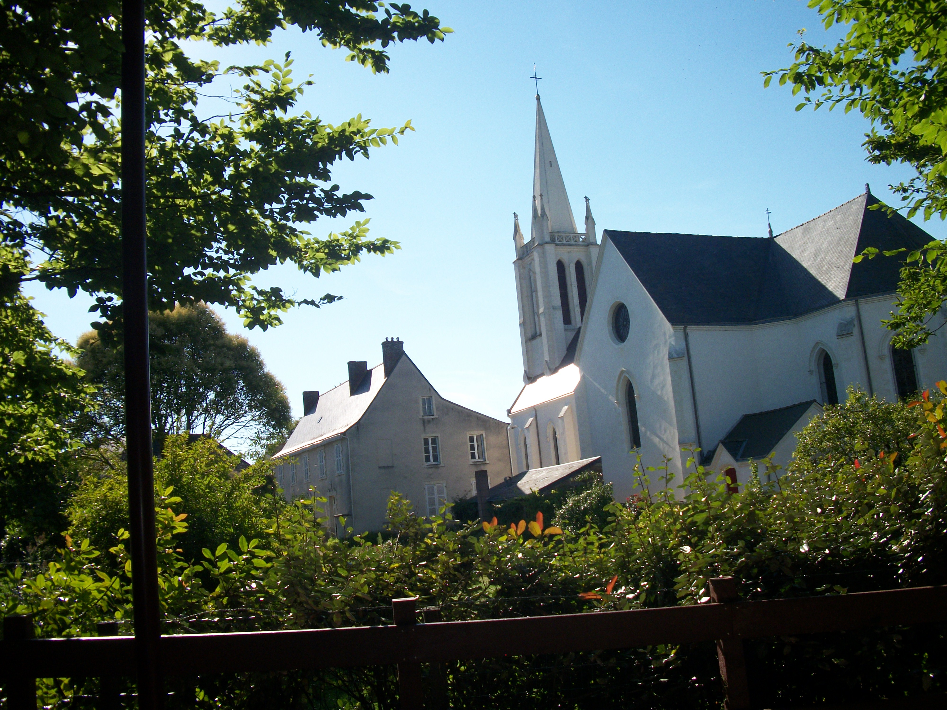 Eglise